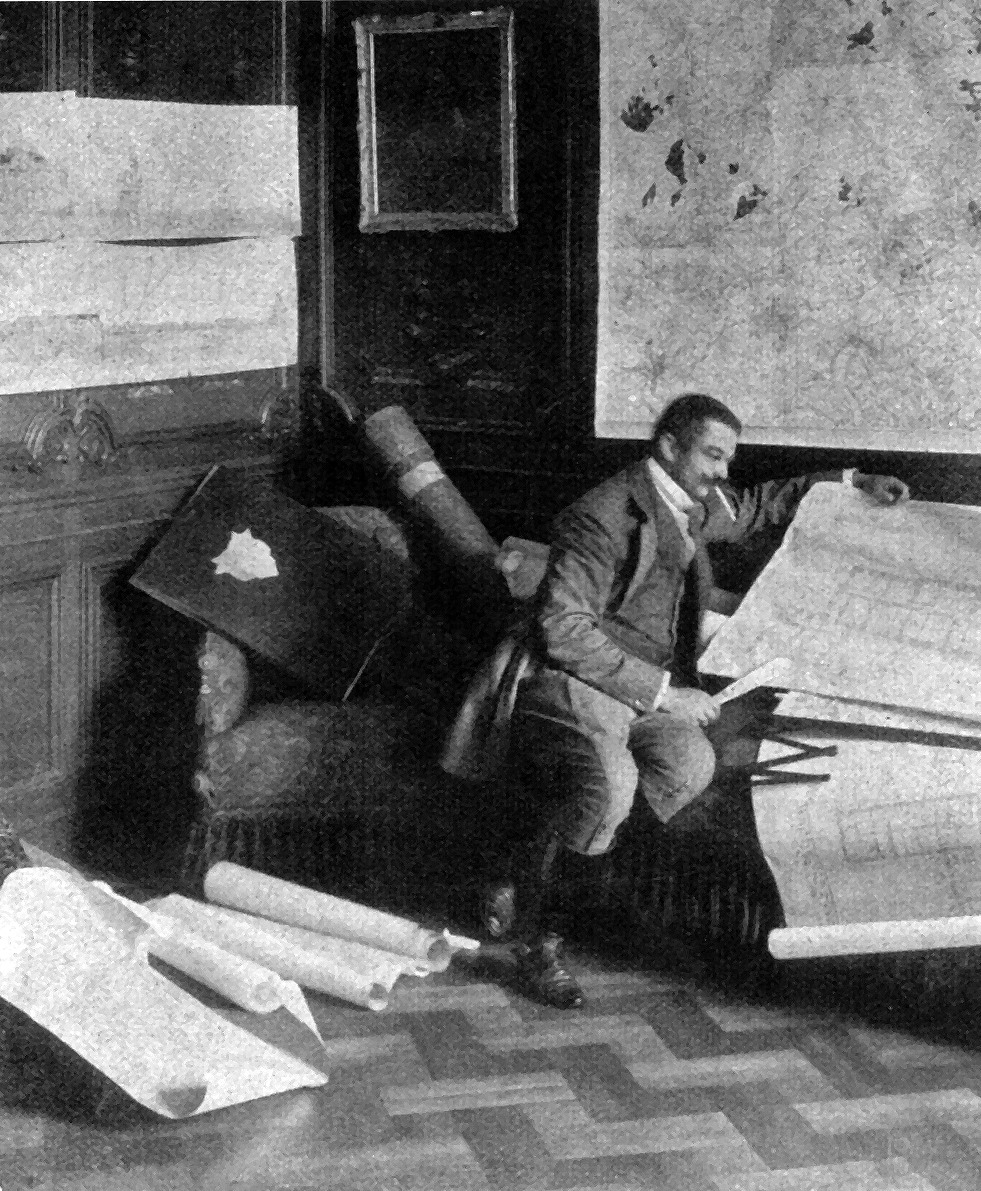 Engelbert-Maria, 9. Herzog von Arenberg, im Arbeitszimmer des Schlosses Norkirchen bei seinen Plänen und Zeichnungen